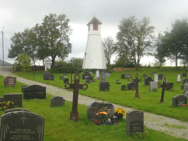 From Heim kirke in Norway